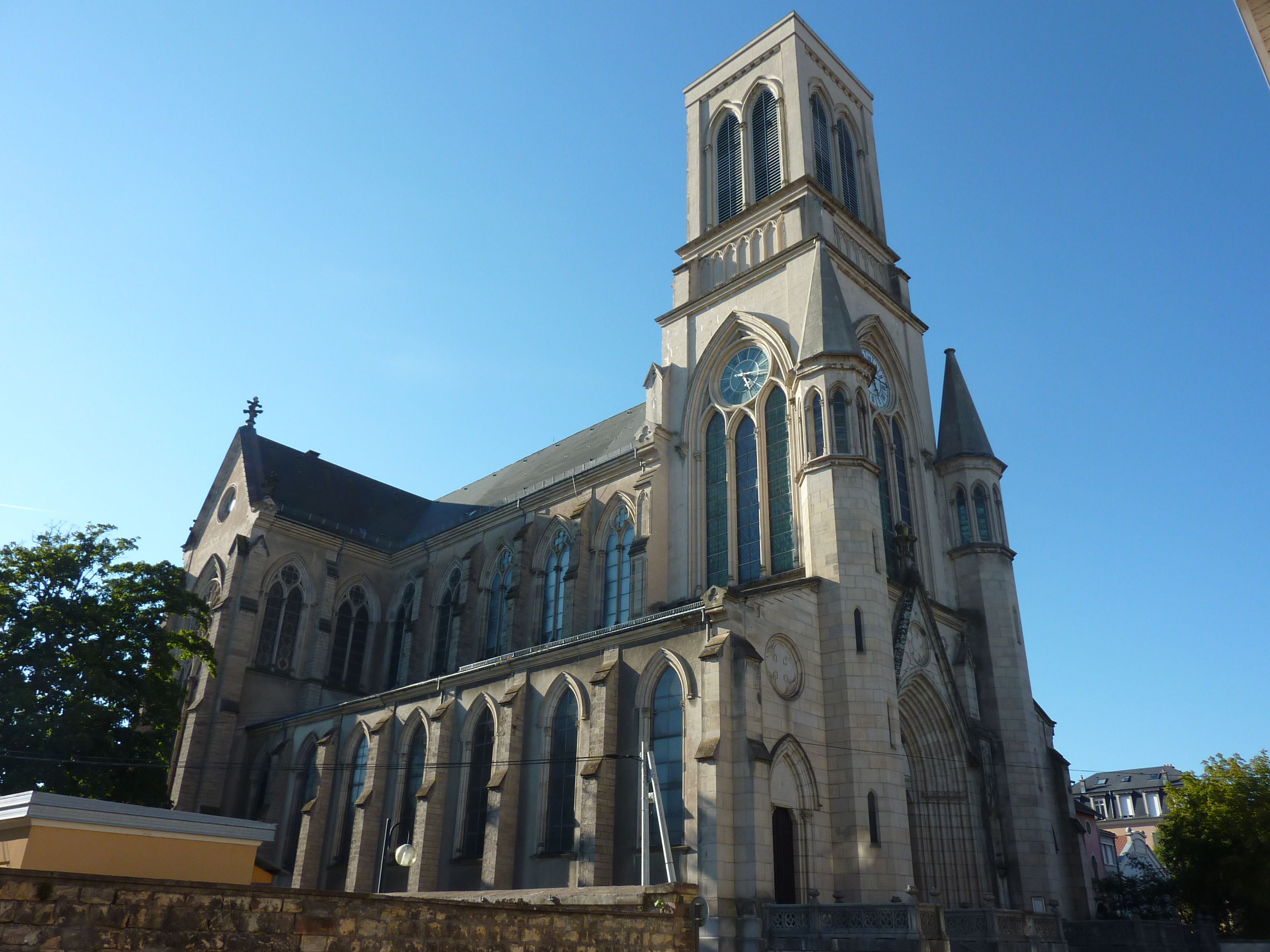 l'église Saint-Joseph de Belfort